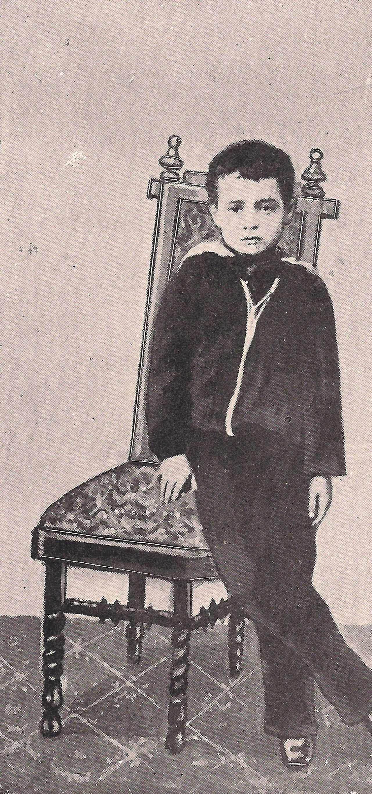 San Giuseppe Moscati Fanciullo